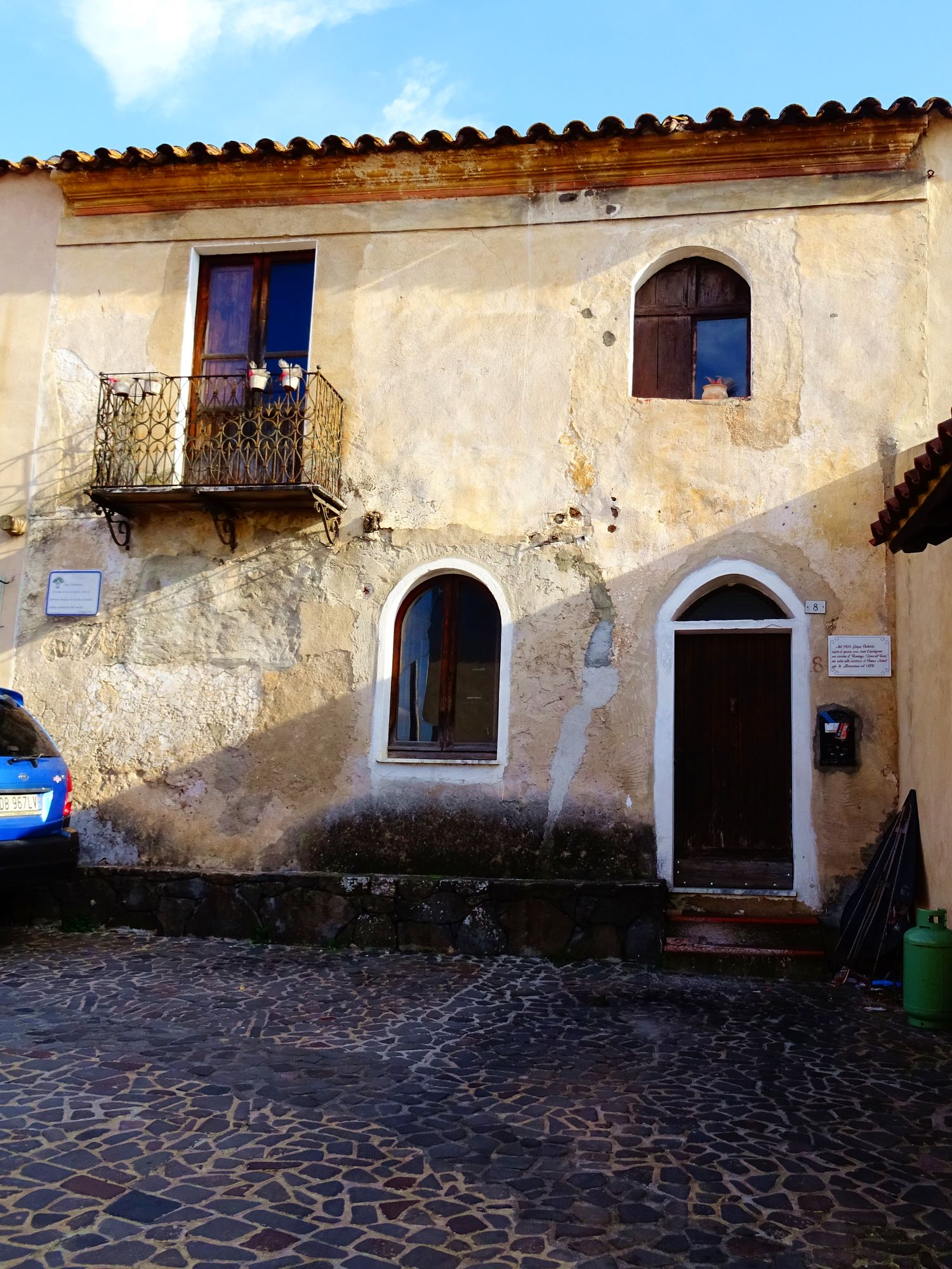 Casa delle sorelle Nieddu a Galtellì in cui soggiornò Grazia Deledda e alla quale si ispirò per descrivere la casa delle dame Pintor nel romanzo "Canne al vento".